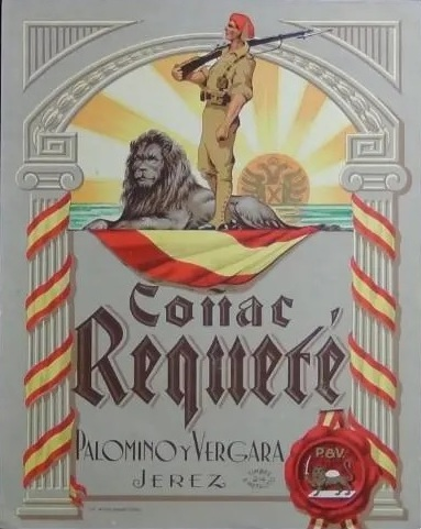 Conac Requete, produziert von Palomino & Vergara aus Jerez de la Frontera, Spanien